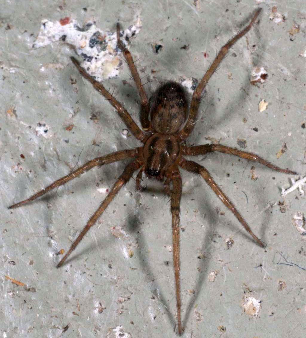 Husedderkopp Tegenaria domestica har siksakmønster på bakkroppen og svake mørkere ringer på beina. Dette er en hunn. Template:Byline